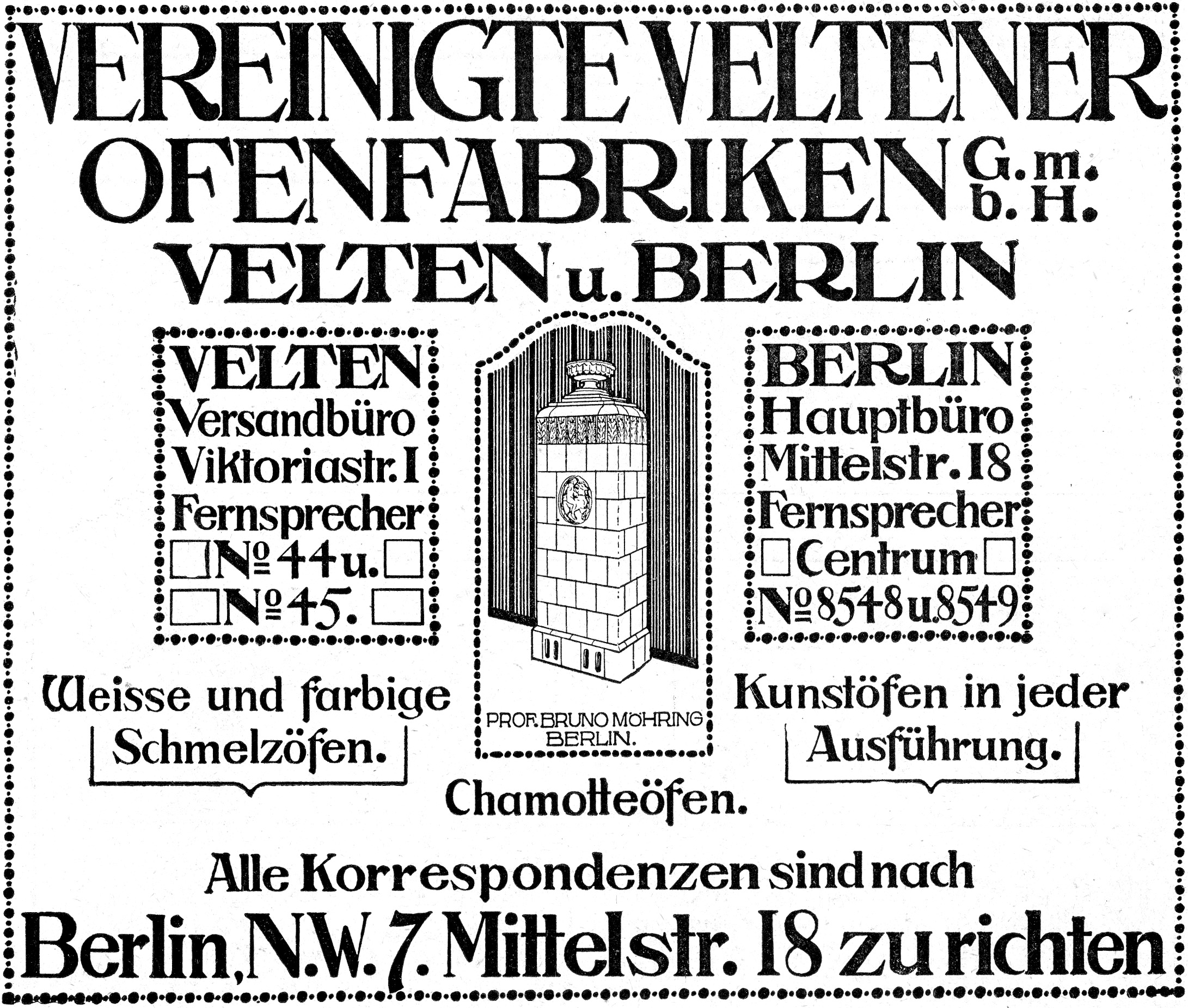 Werbeanzeige der Vereinigten Veltener Ofenfabriken G.m.b.H. mit einem Entwurf von Bruno Möhring